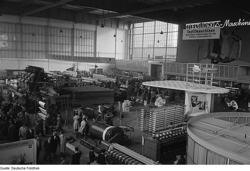 Original image description from the Deutsche Fotothek Textilmaschinen des Kombinats Textima als Produktionsstraße "von der Spinnerei bis zur fertigen Strickware" auf der Leipziger Herbstmesse 1954